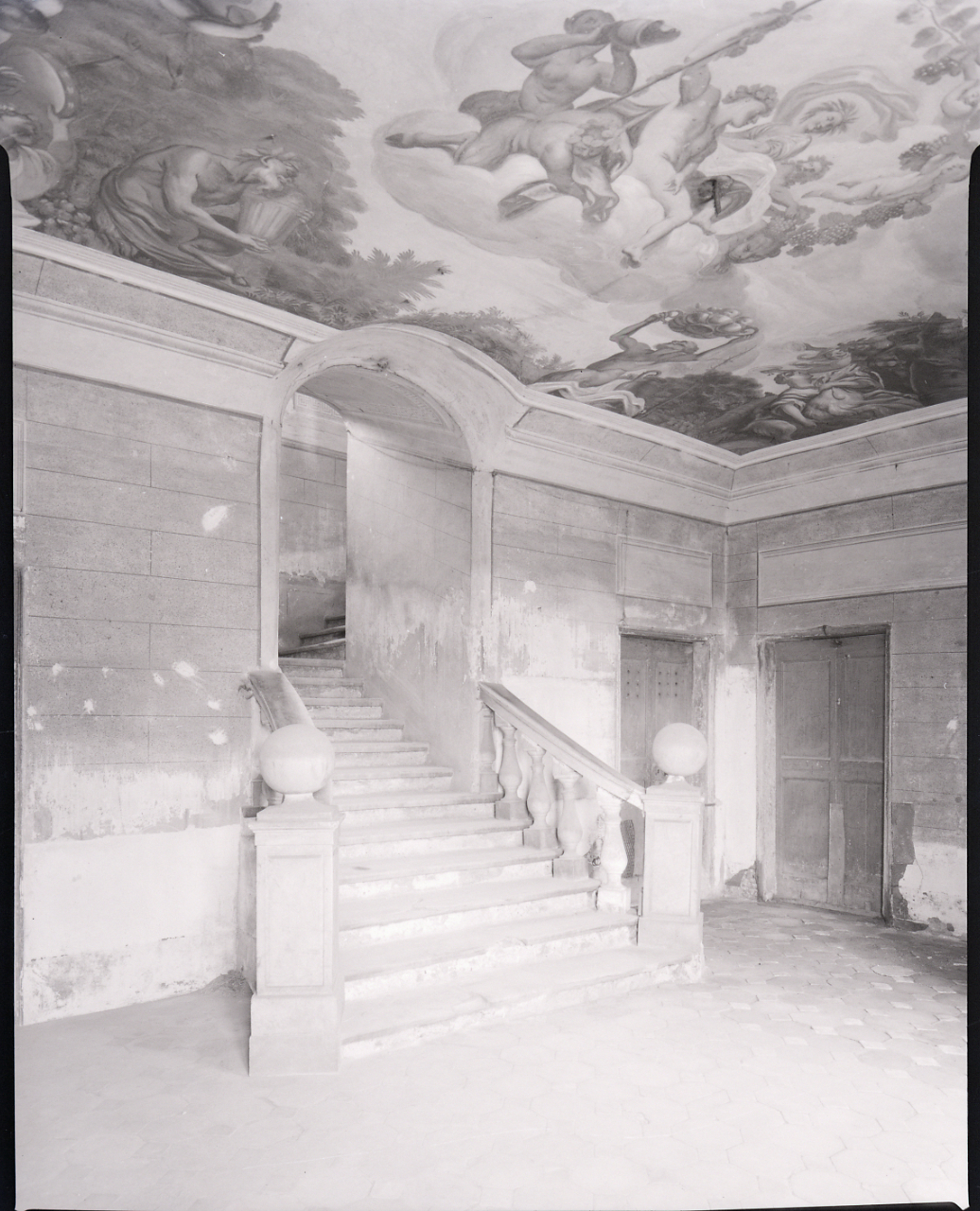 Servizio fotografico : Genova, 1964 / Paolo Monti. - Buste: 5, Fototipi: 5 : Negativo b/n, gelatina bromuro d'argento/ pellicola ; 10x12. - ((Serie costituita da 5 buste sciolte di negativi identificati con i nn.: 8343, 8344, 8345, 8346, 8346bis. - Il negativo identificato con il numero 46397 è stato realizzato per Zodiac. - Occasione: Documentazione per la pubblicazione: Italia Nostra (a cura di), "Le ville genovesi", catalogo della mostra, Genova 1962, Genova, Comune di Genova, 1967. - Fonte: Monografia di Italia Nostra (a cura di): Le ville genovesi, catalogo della mostra, Genova 1962, Genova, Comune di Genova (1967). - Fonte: Lettera di Paolo Monti: I. Carteggi/ Genova - Enrico (1963-1966), presso Archivio Paolo Monti. Camicia con documenti dattiloscritti e manoscritti vari relativi al lavoro eseguito per Italia Nostra: preventivi, lettere, inventari. - Fonte: Agenda di Paolo Monti: Monti/ 2/ 6 giugno 1964 - 31 marzo 1966/ 8194-12420 (1964-1966), presso Archivio Paolo Monti